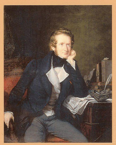 Portrait d’Alfred de Vigny